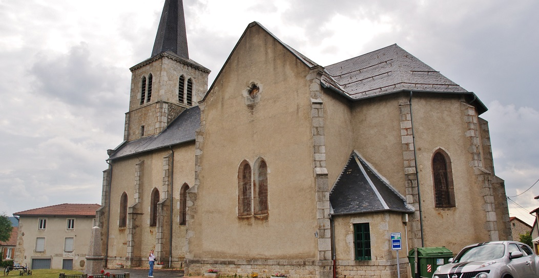 église Ste Marie